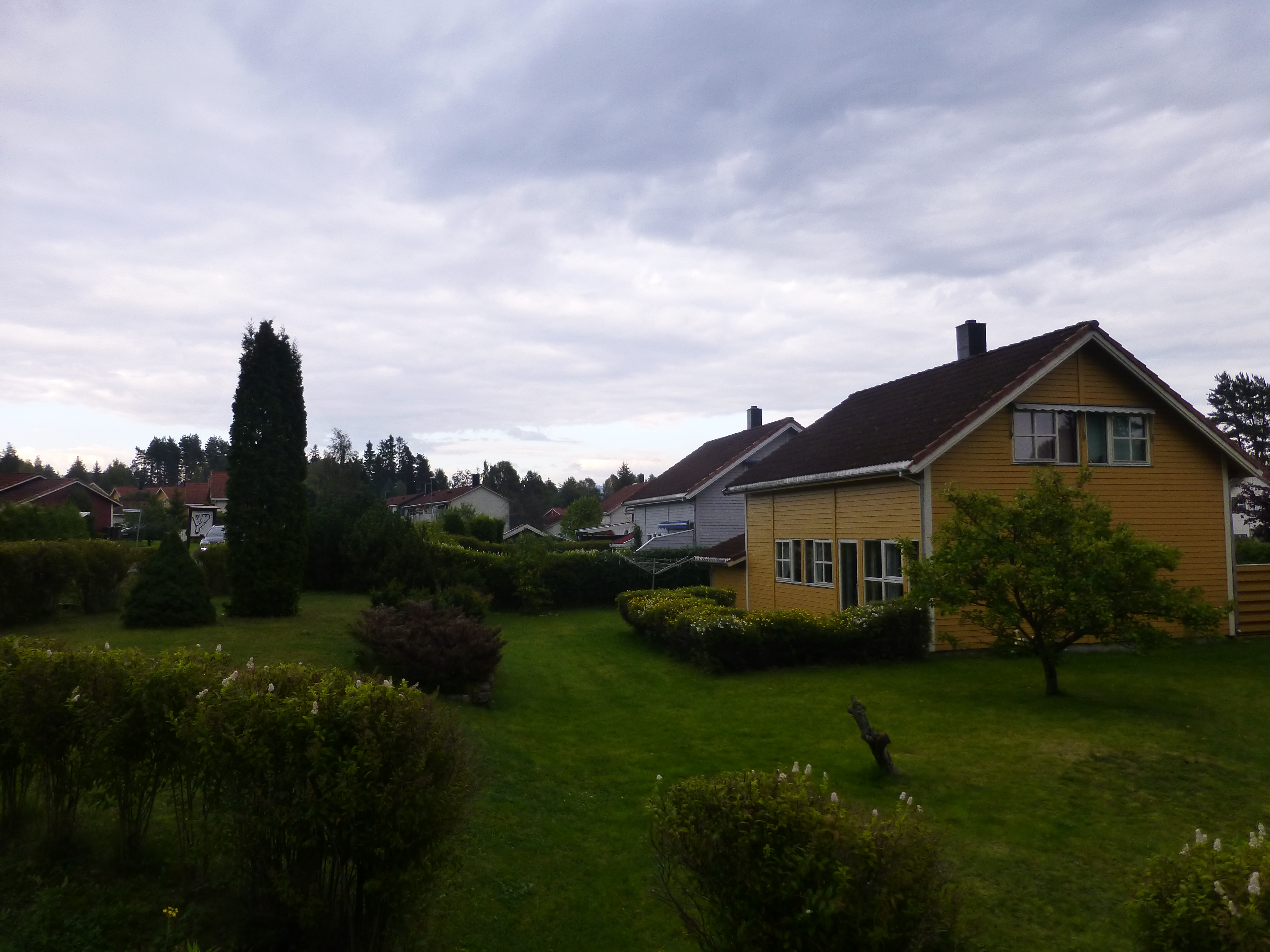 Eneboliger i Sagatun borettslag (RINGBO), i Hønefoss, Ringerike, Norge.